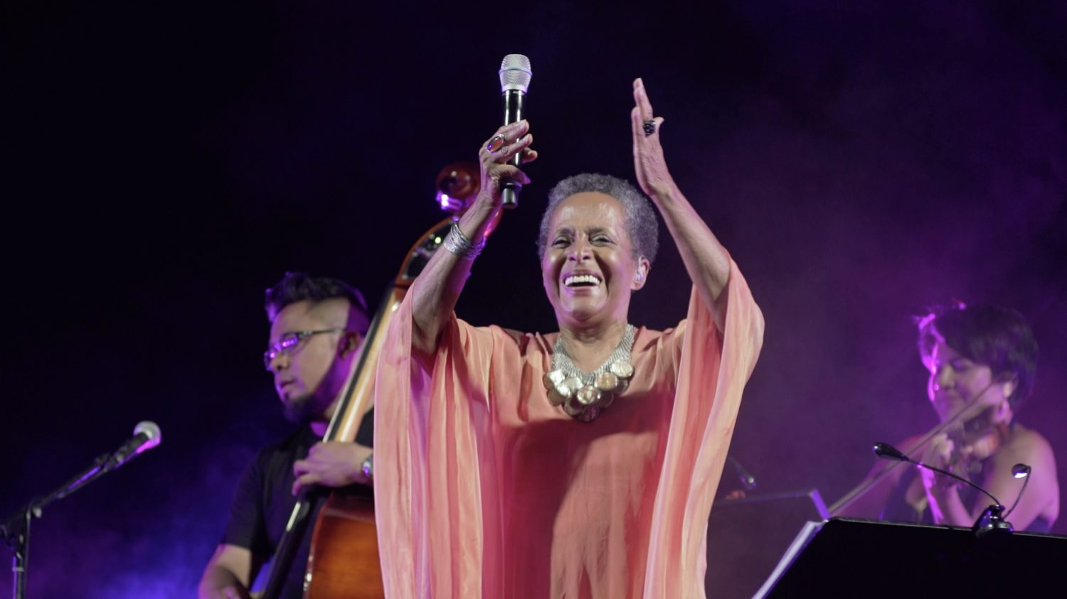 Los jardines de la Quinta de El Pardo fueron testigo anoche de los landós, pregones, y alegres panalavios que Susana Baca ofreció a los asistentes, en un amplio repertorio de ritmos afroperuanos recopilados y documentados por ella, dentro de un trabajo de investigación musical que, junto a su extraordinaria voz, le ha valido reconocimiento mundial.